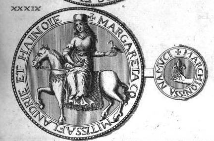 Markéta Flanderská